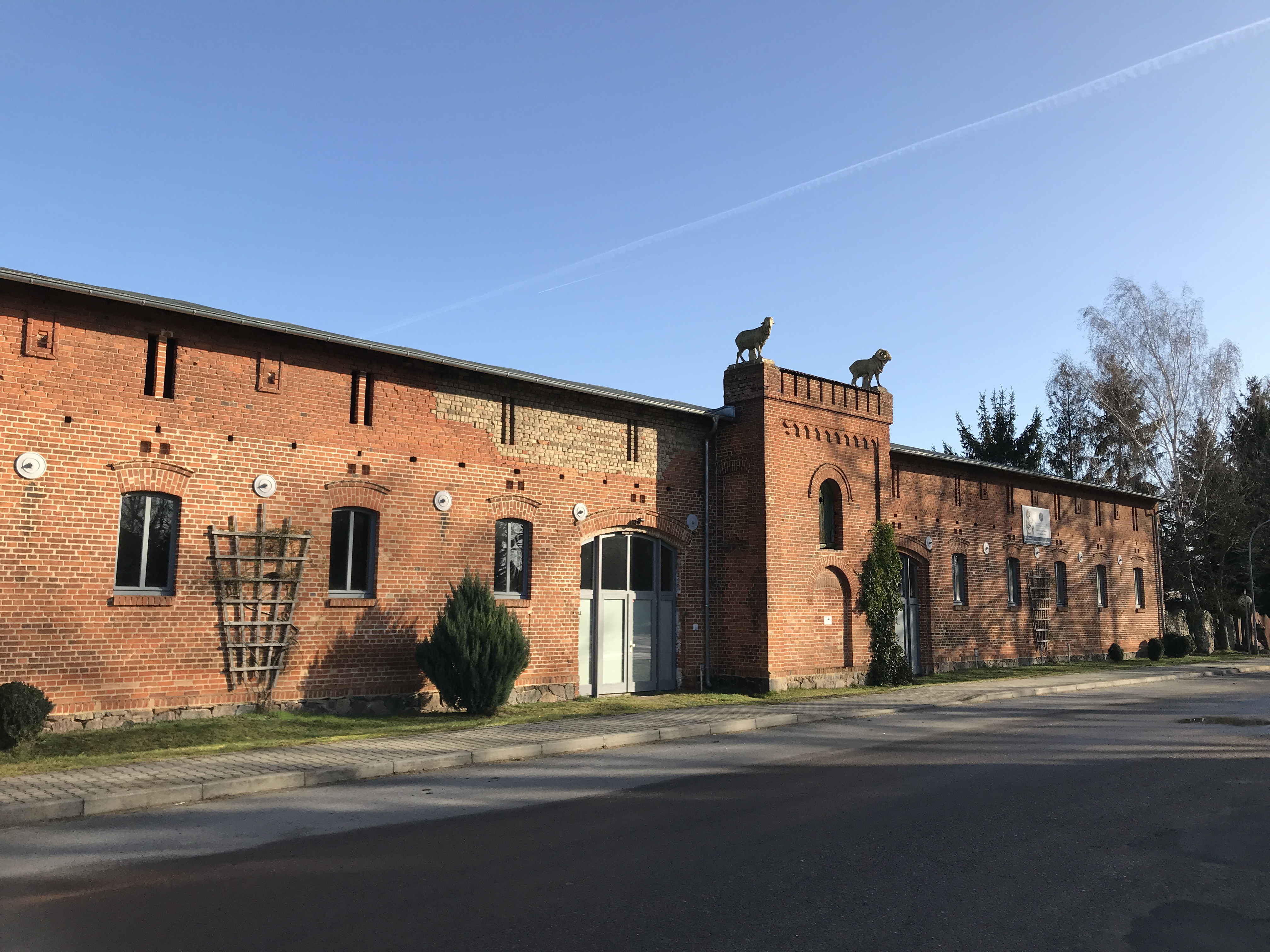 Denkmalgeschützter Schafstall in Niebendorf, gemeinsam mit Heinsdorf ein Ortsteil von Dahme/Mark in Brandenburg